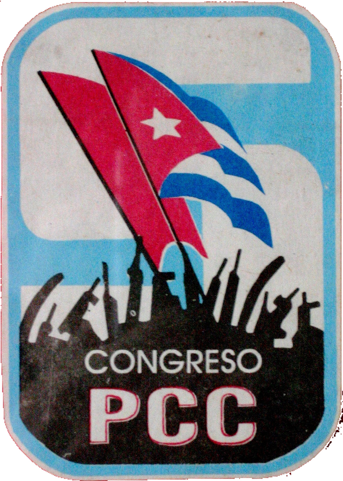 Емблема на 5ти конгрес на Кубинската комунистическа партия.